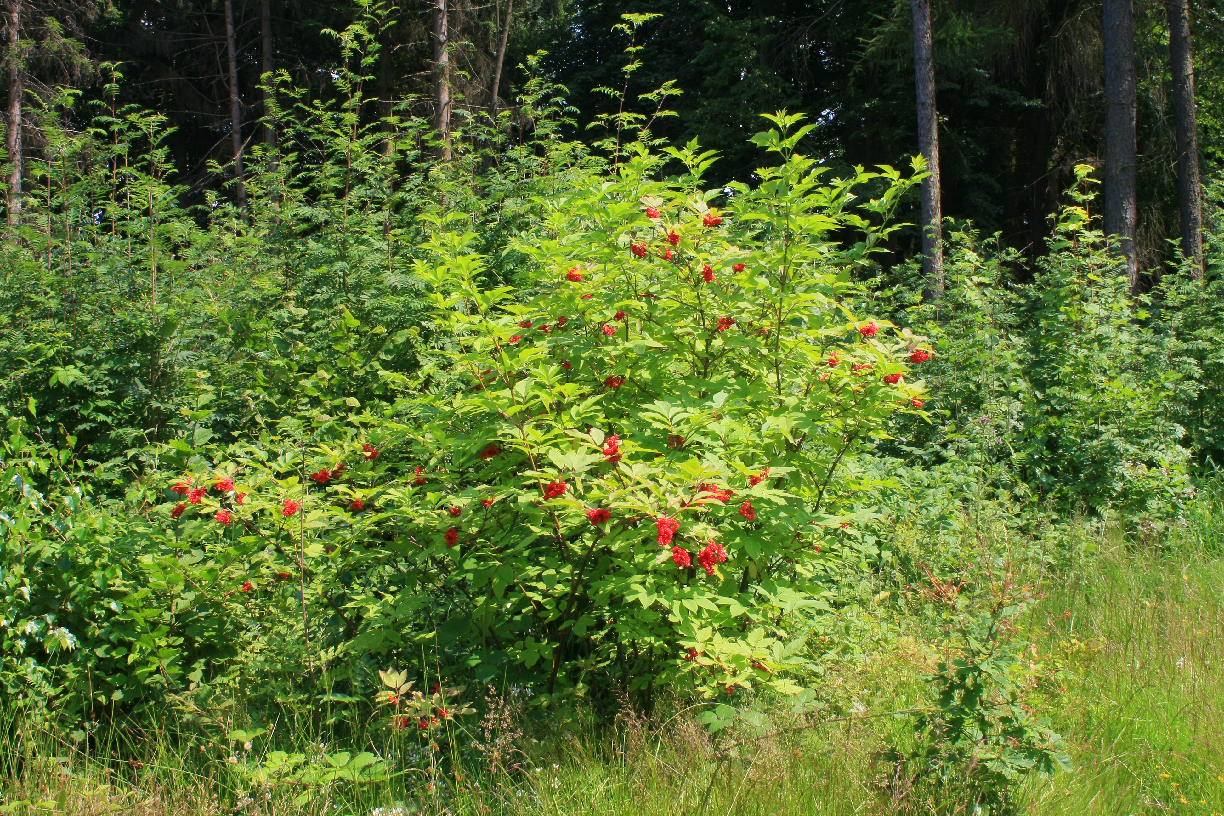 Roter Holunder (Sambucus racemosa) auf den Lahnbergen, Hessen, Deutschland.